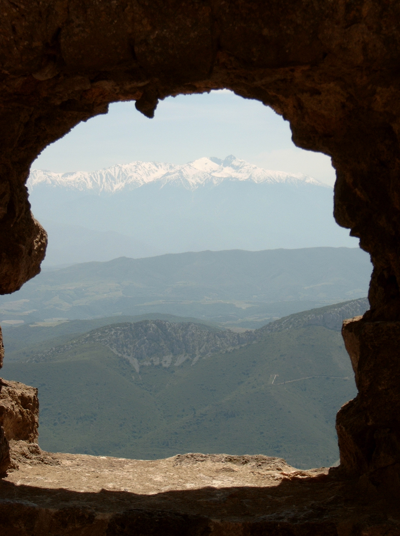 photo perso 2004. vue depuis le chateau de Quéribus situé sur la commune de Cucugnan, Aude, France